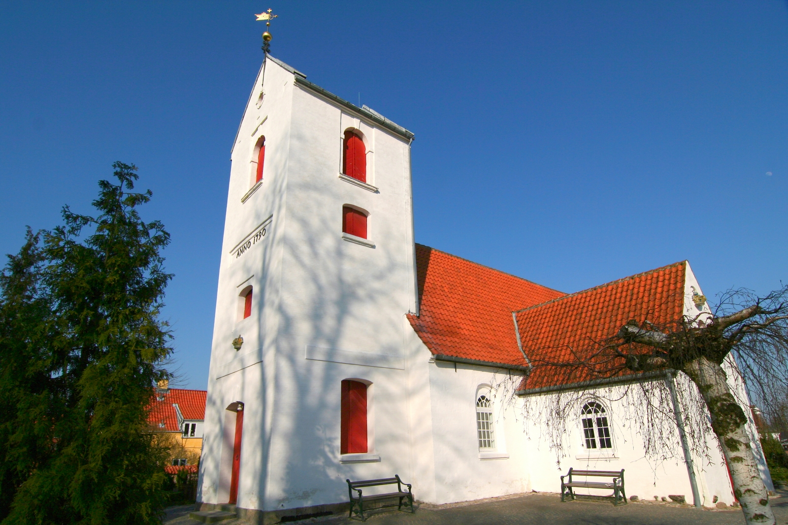 Hvidovre Kirke